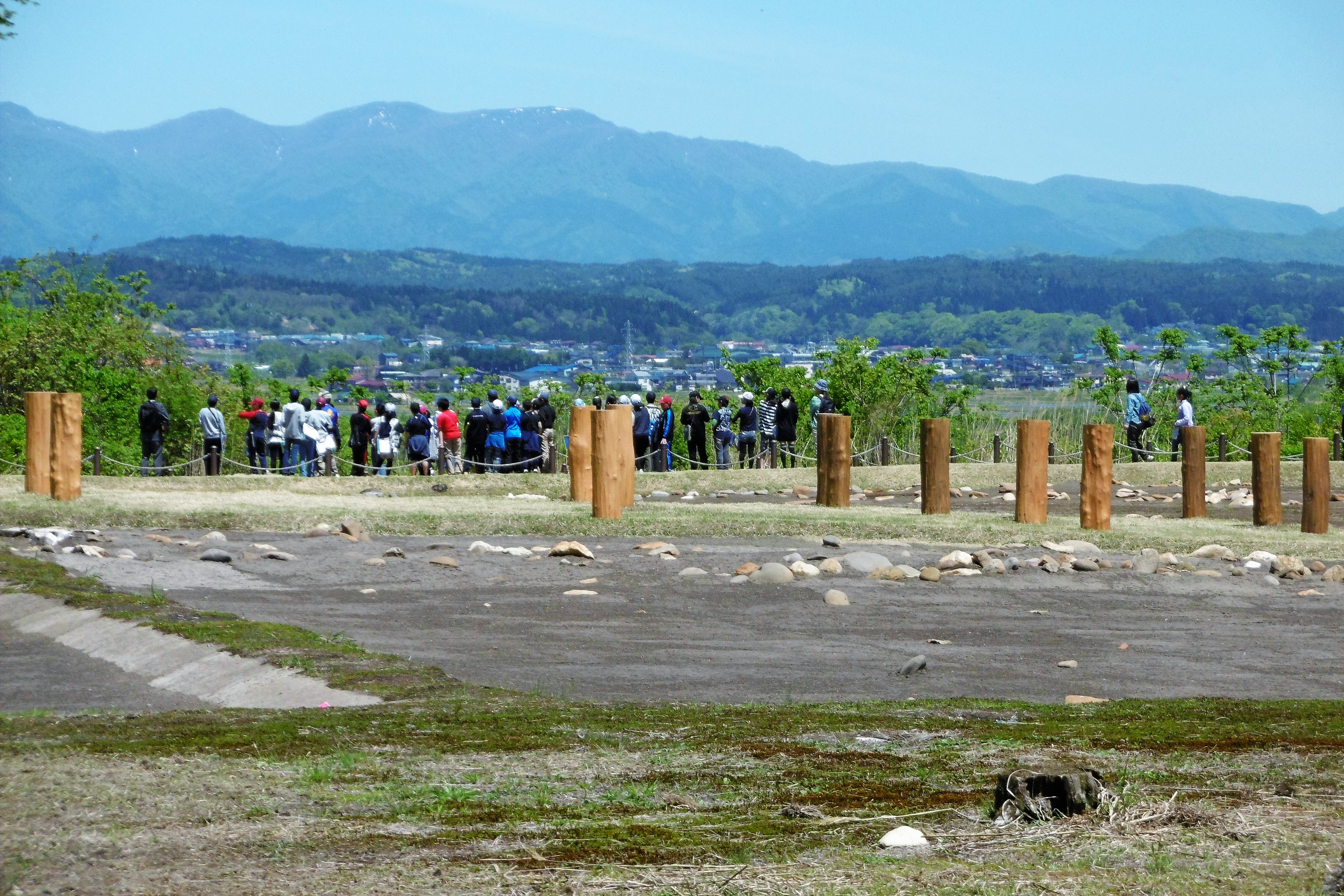 伊勢堂岱遺跡・秋田県北秋田市